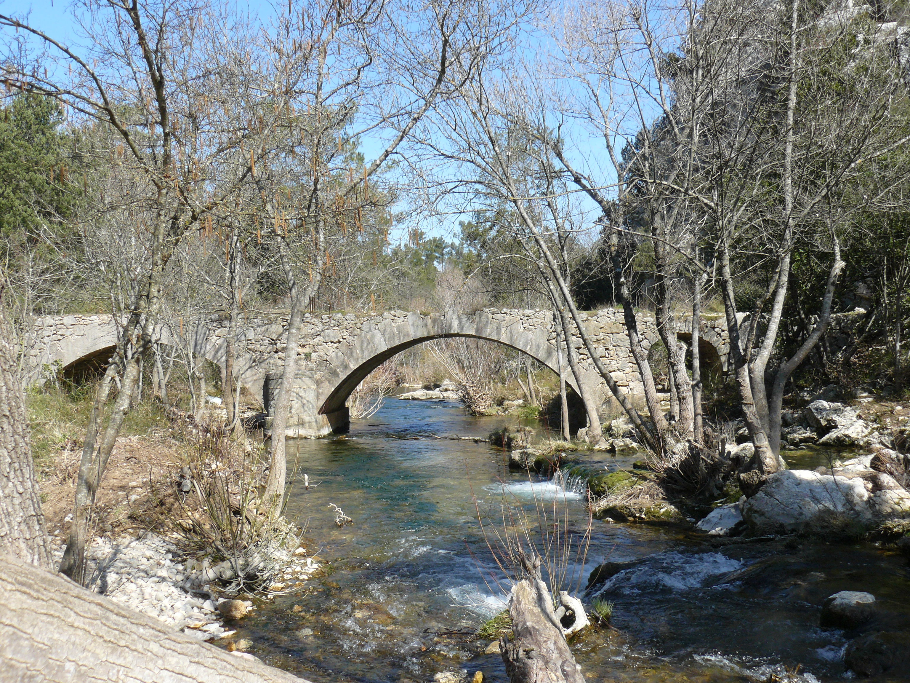 Pont sur le Caramy, Tourves